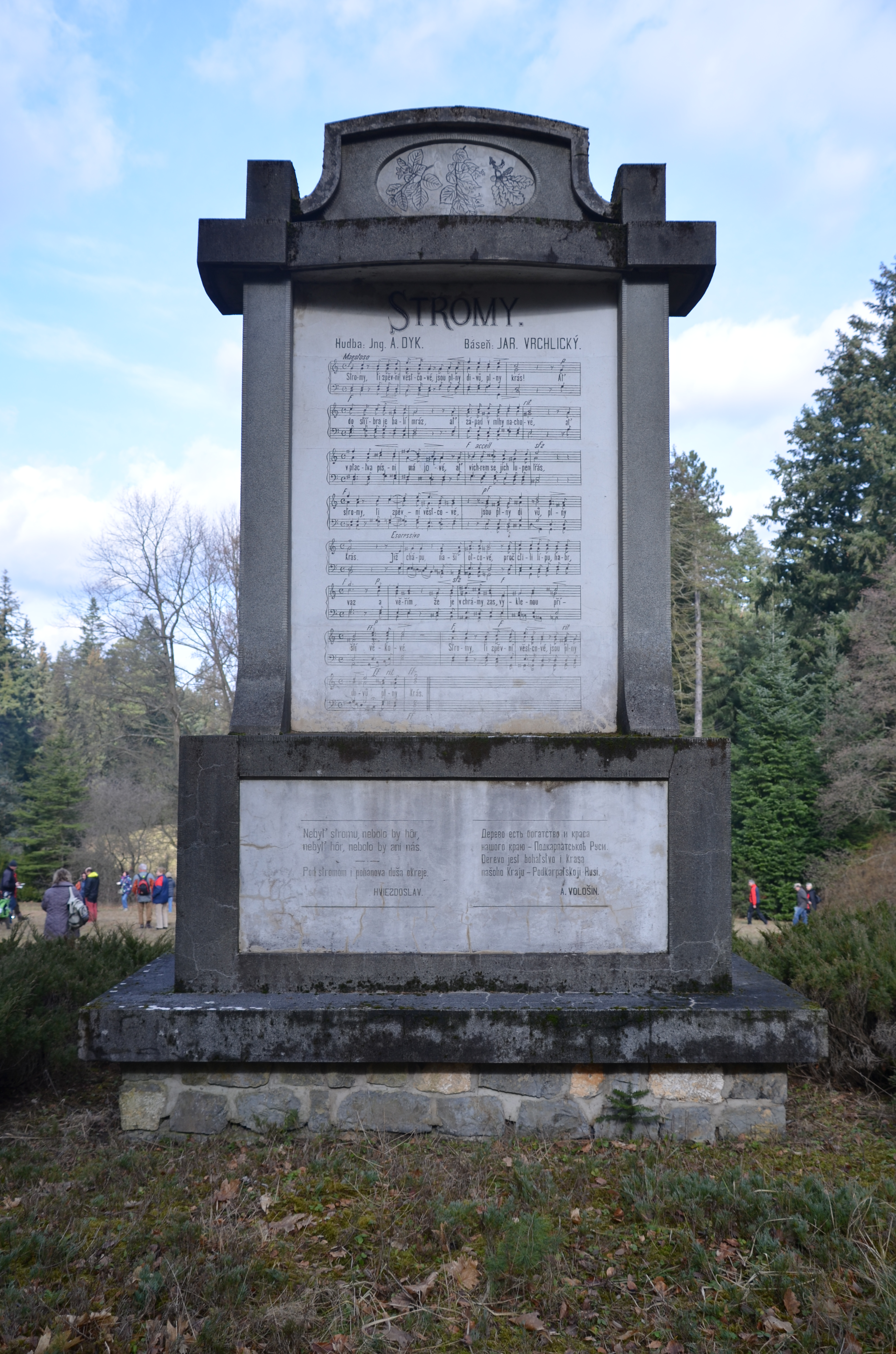 Památník stromů v arboretum Řitmanice